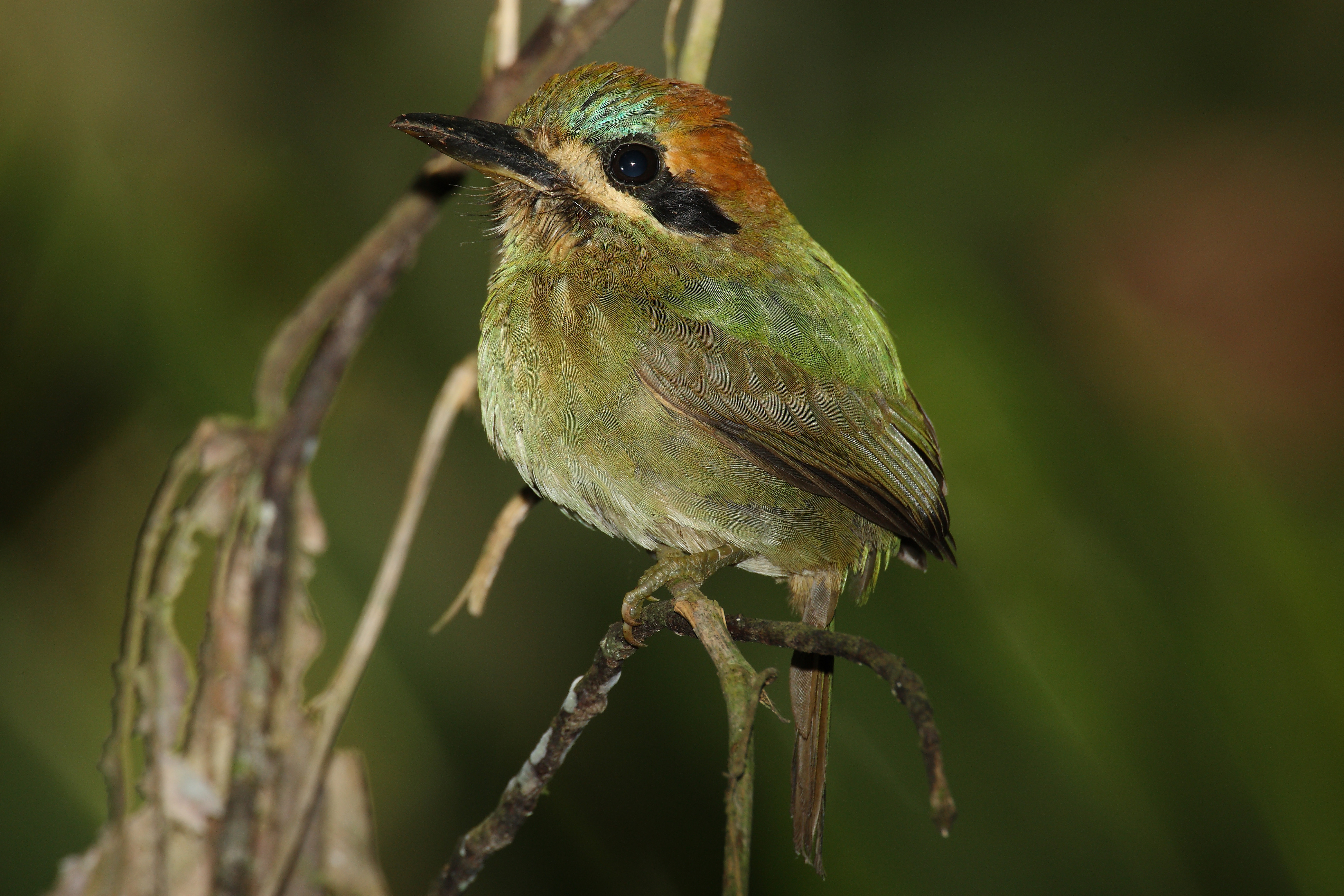 Tody Motmot -- Parque Nacional Darién, Panama -- 2008 February